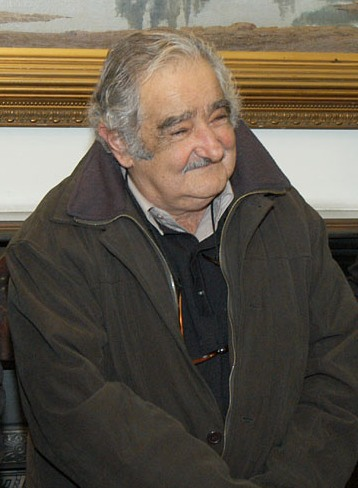 José Mujica.